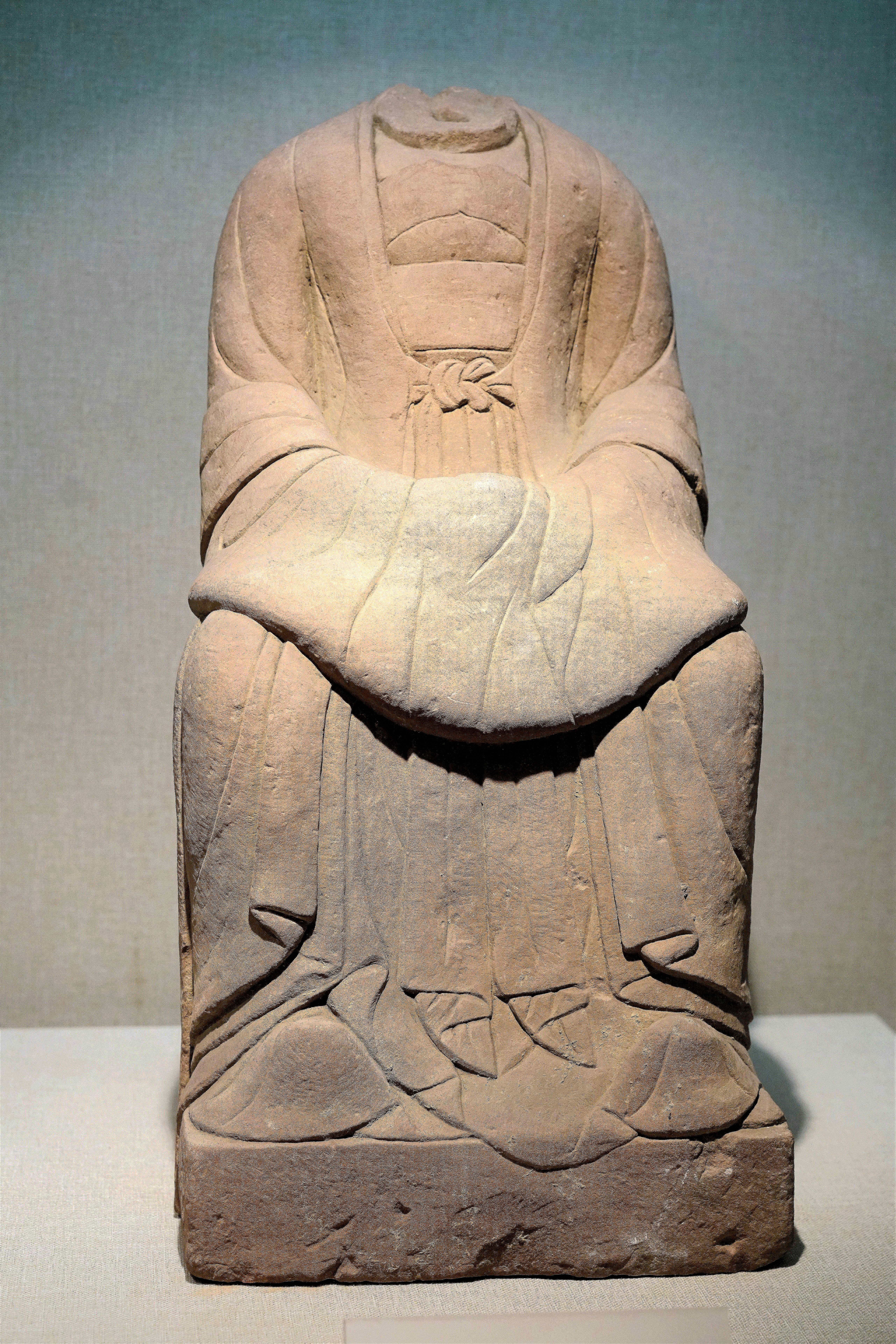 中文（中国大陆）: 周后坐像 前蜀 一级文物 成都白果林小区五代前蜀后妃墓出土